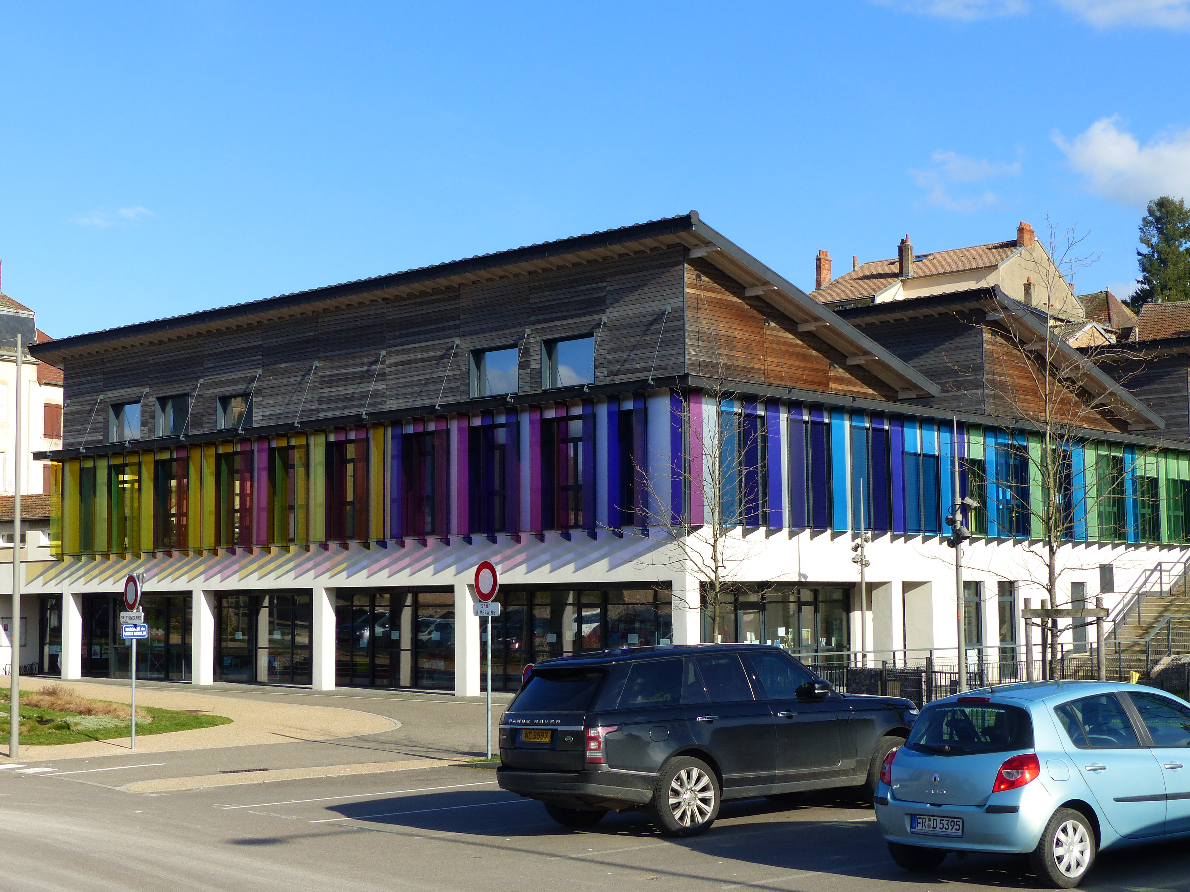 Maison de la petite enfance à La Clayette (Saône-et-Loire, France).